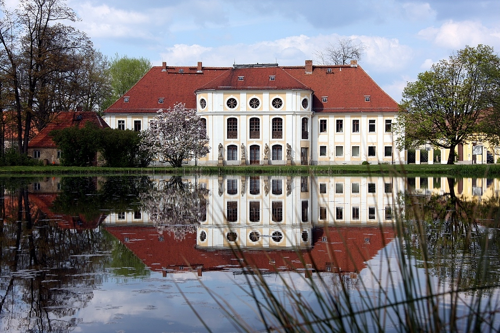 Schloss Koenigswartha